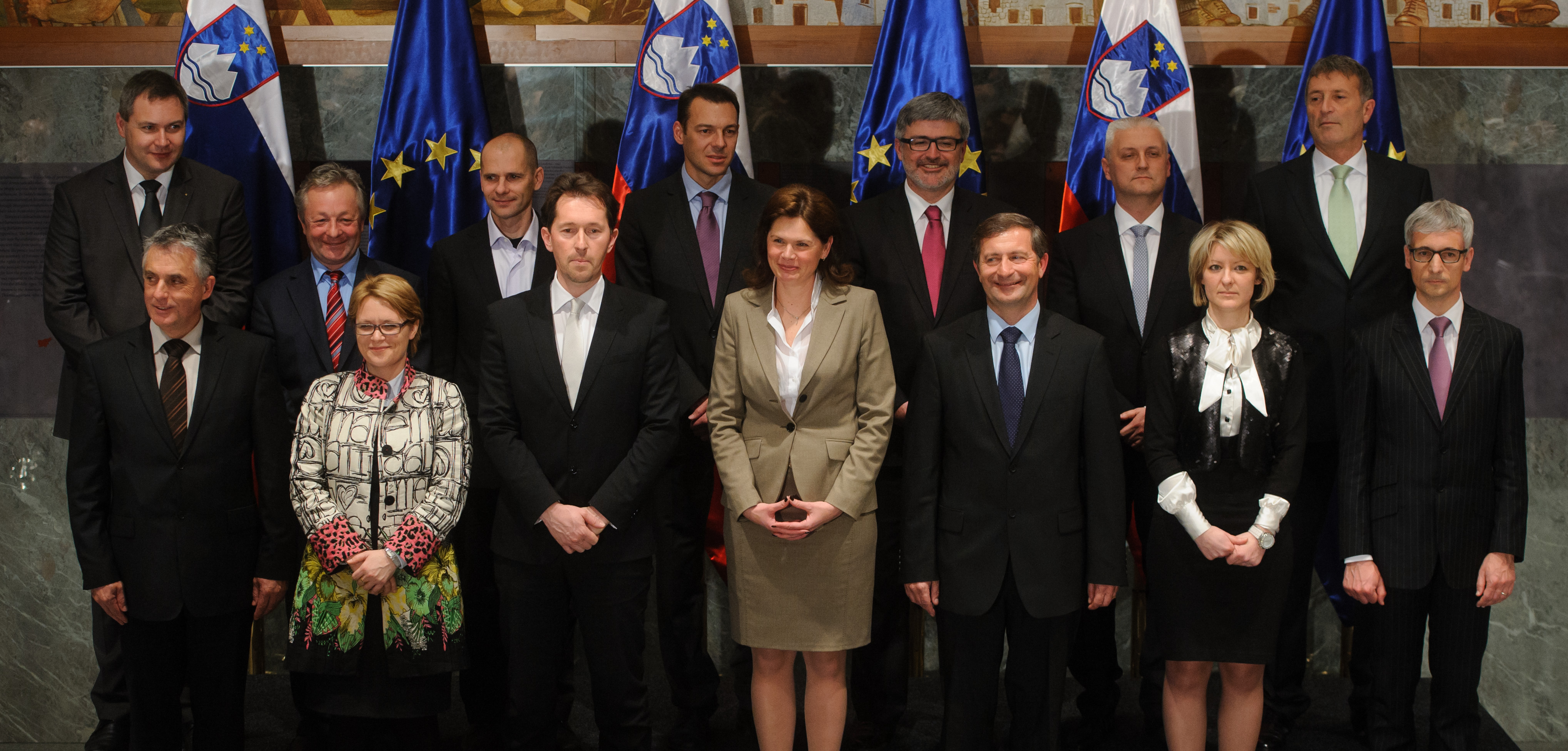 Skupinska fotografija 11. slovenske vlade